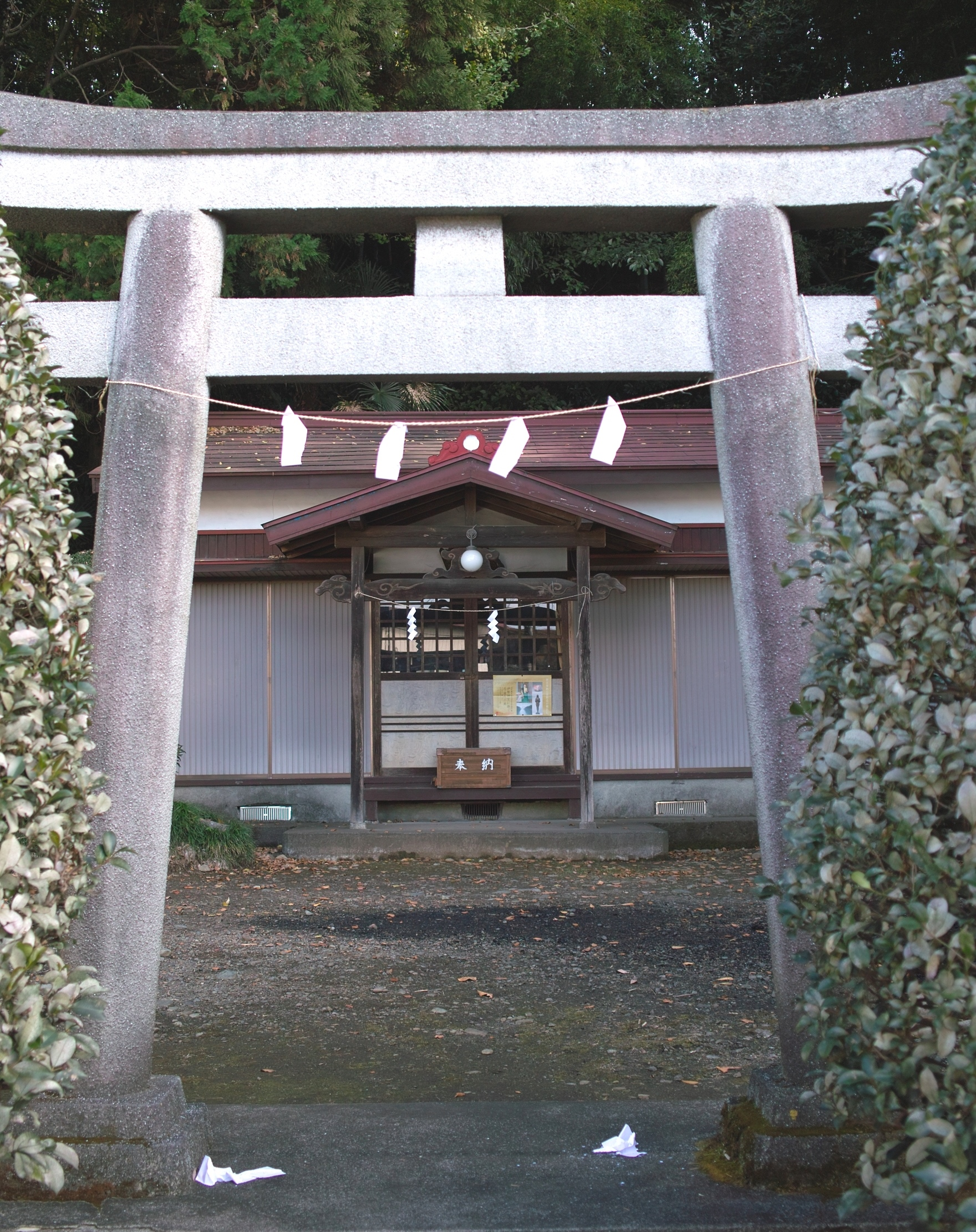 三島神社(当麻)